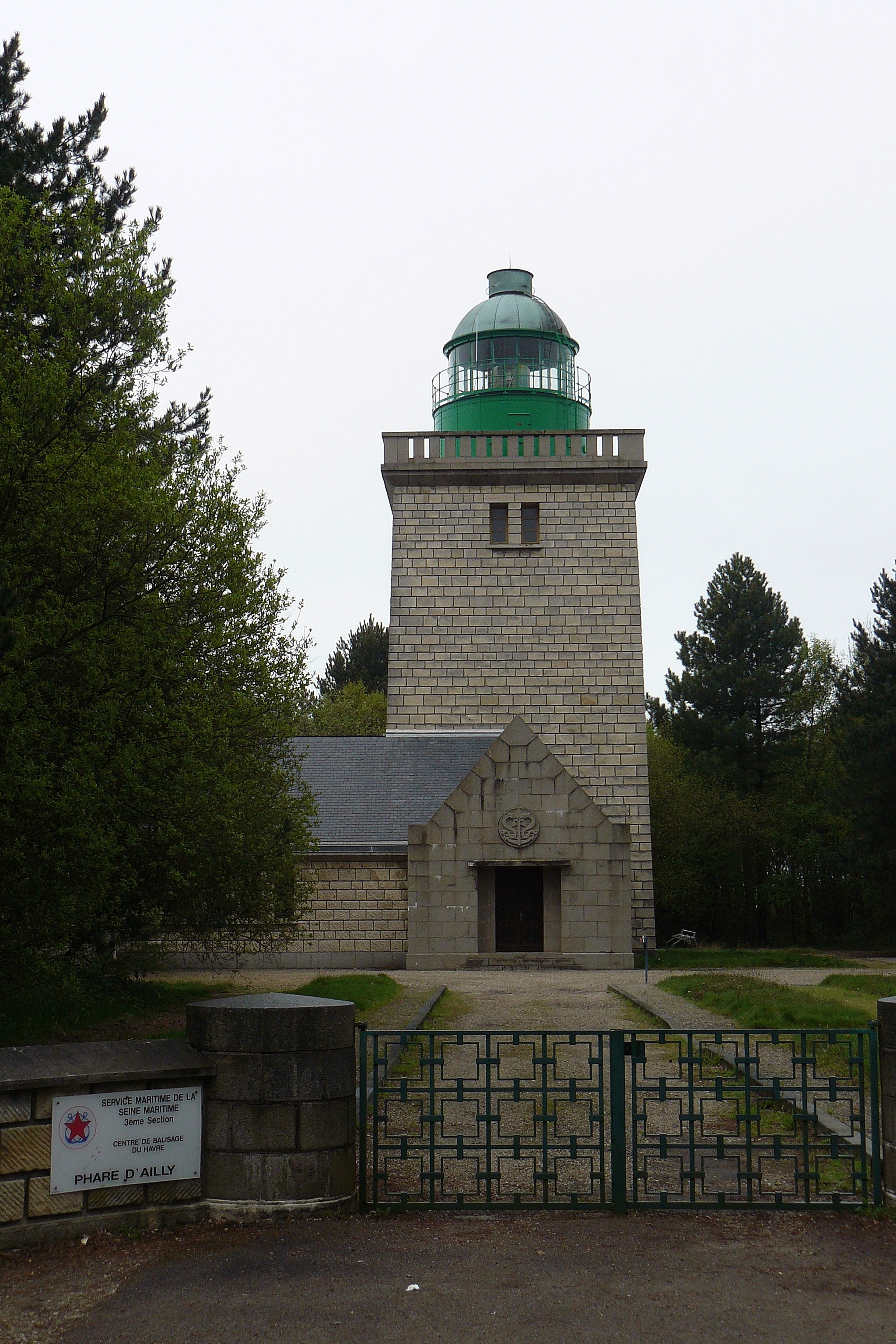 Le phare d'Ailly à Sainte-Marguerite-sur-Mer (Seine-Maritime, France)